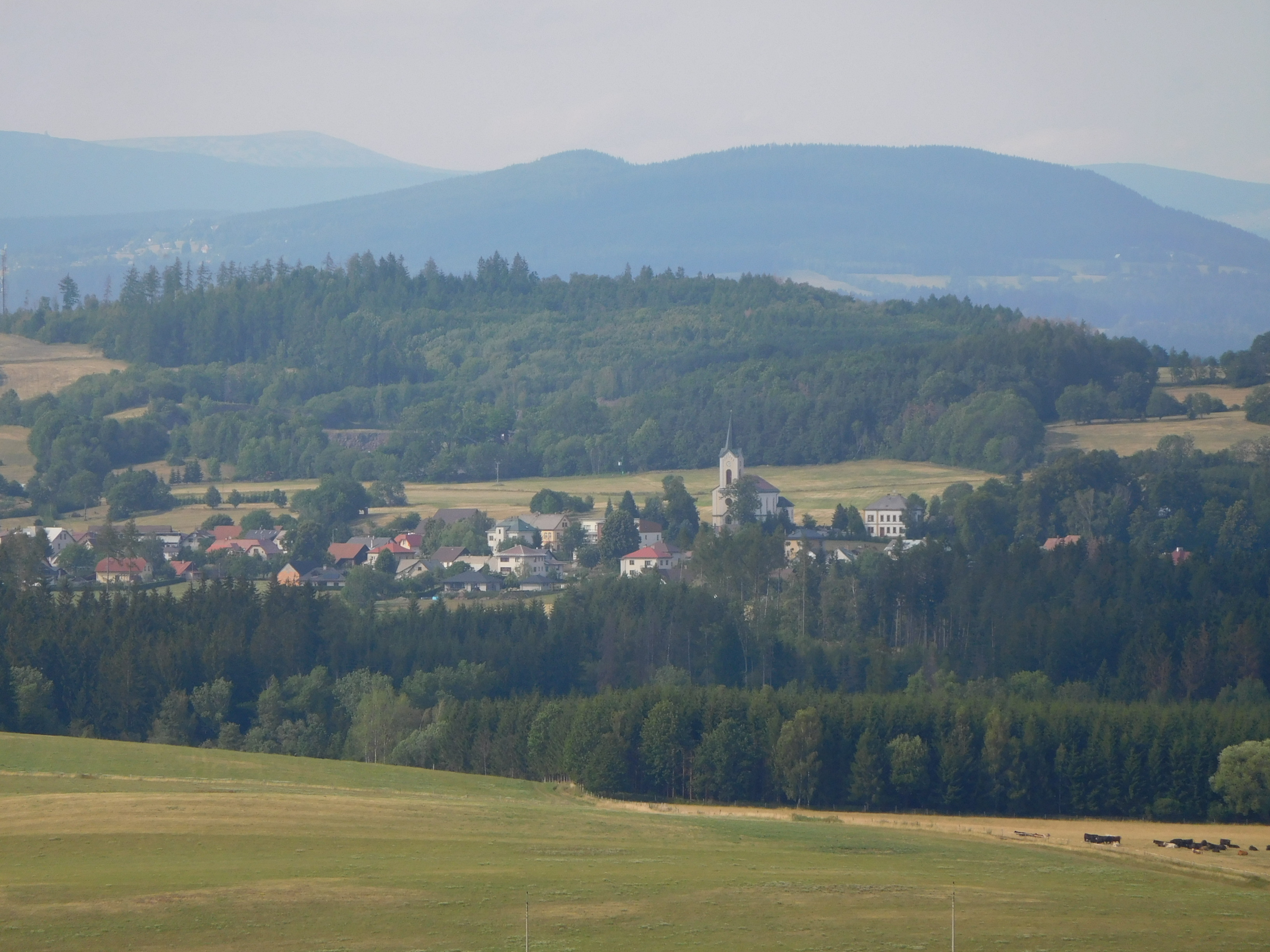 Vidochov - Kozinec, pohled na Studenec